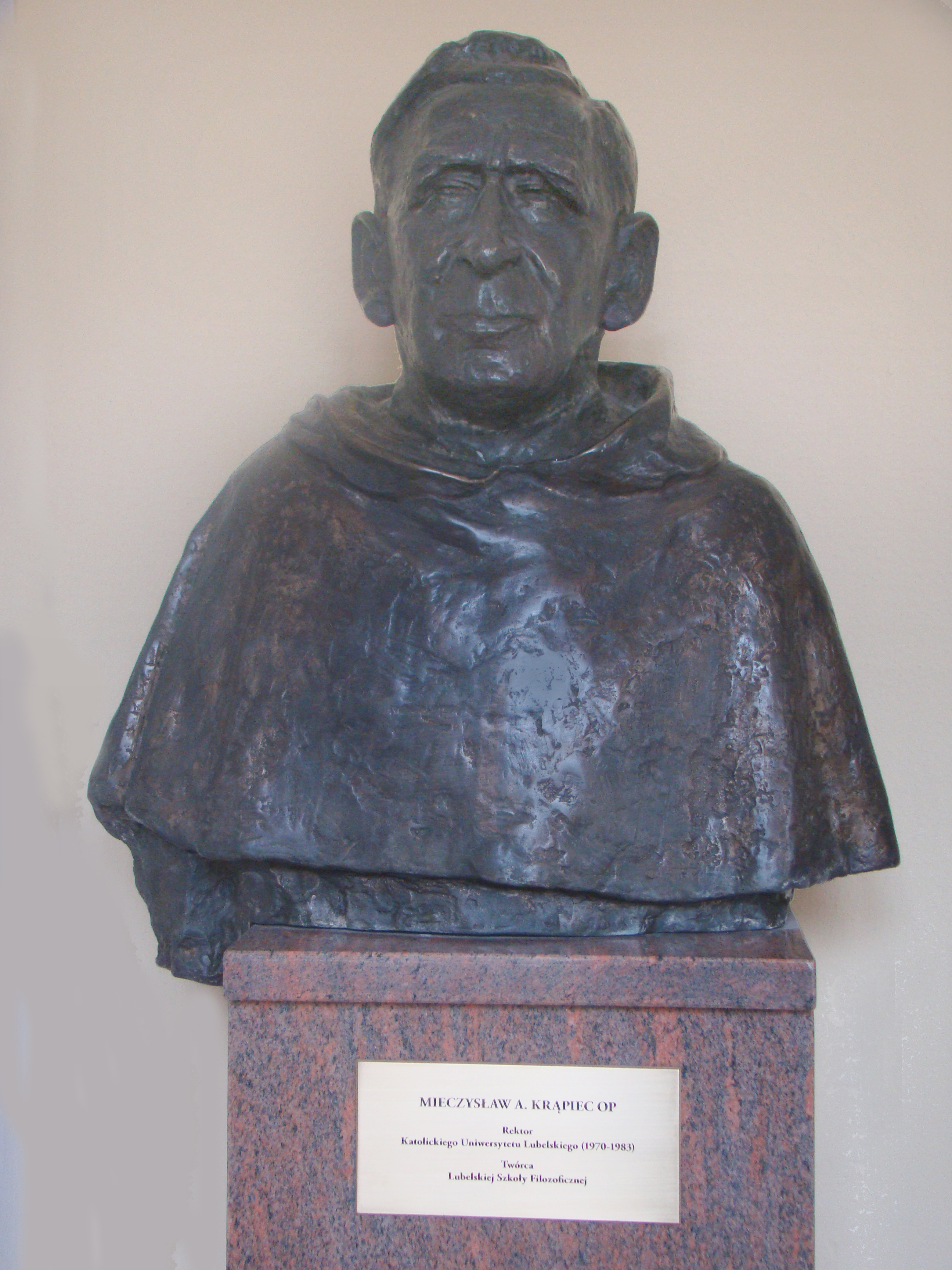 Popiersie o. prof. Krąpca na KUL-u